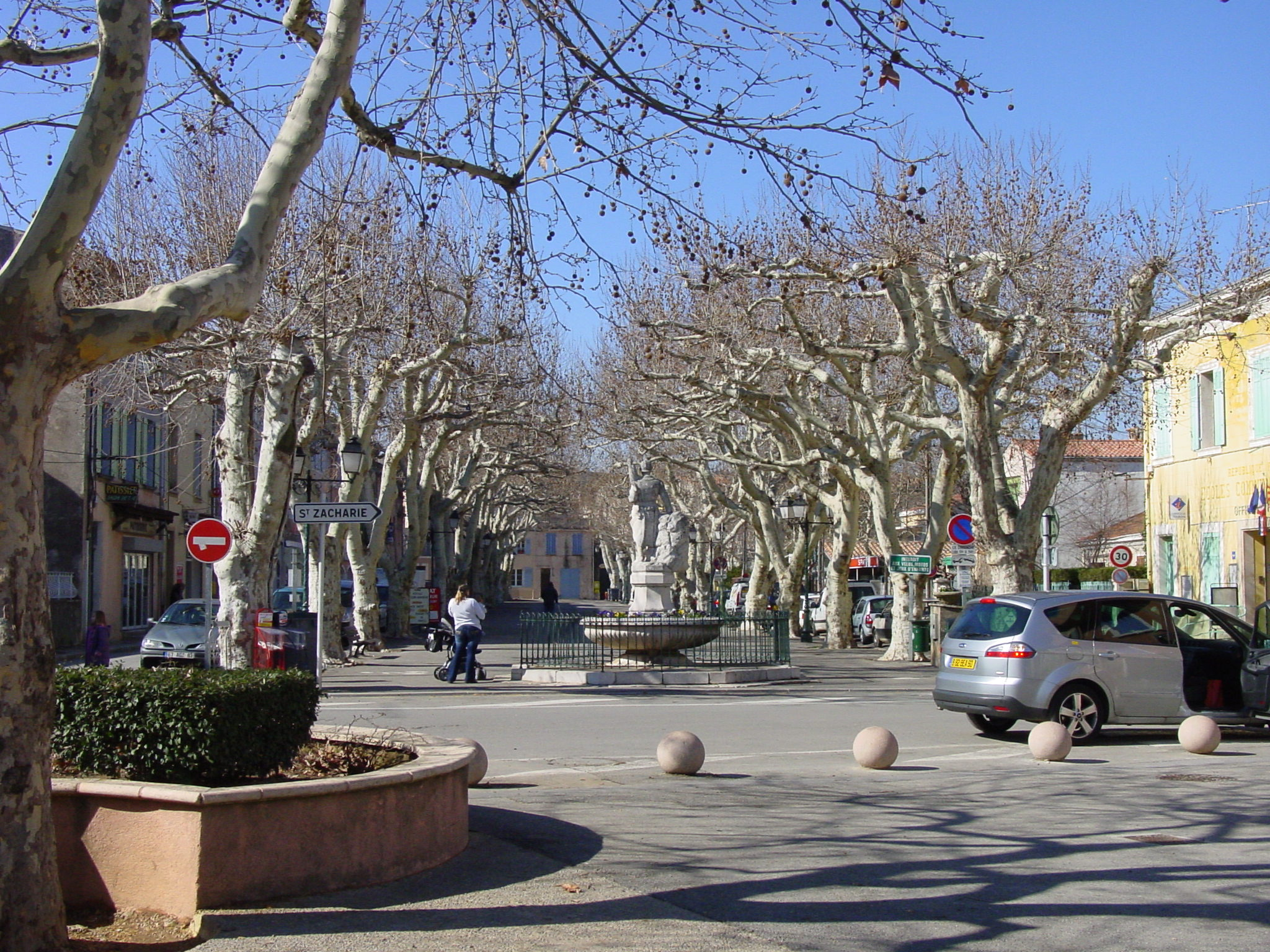 Cours Général de Gaulle à Nans-les-Pins